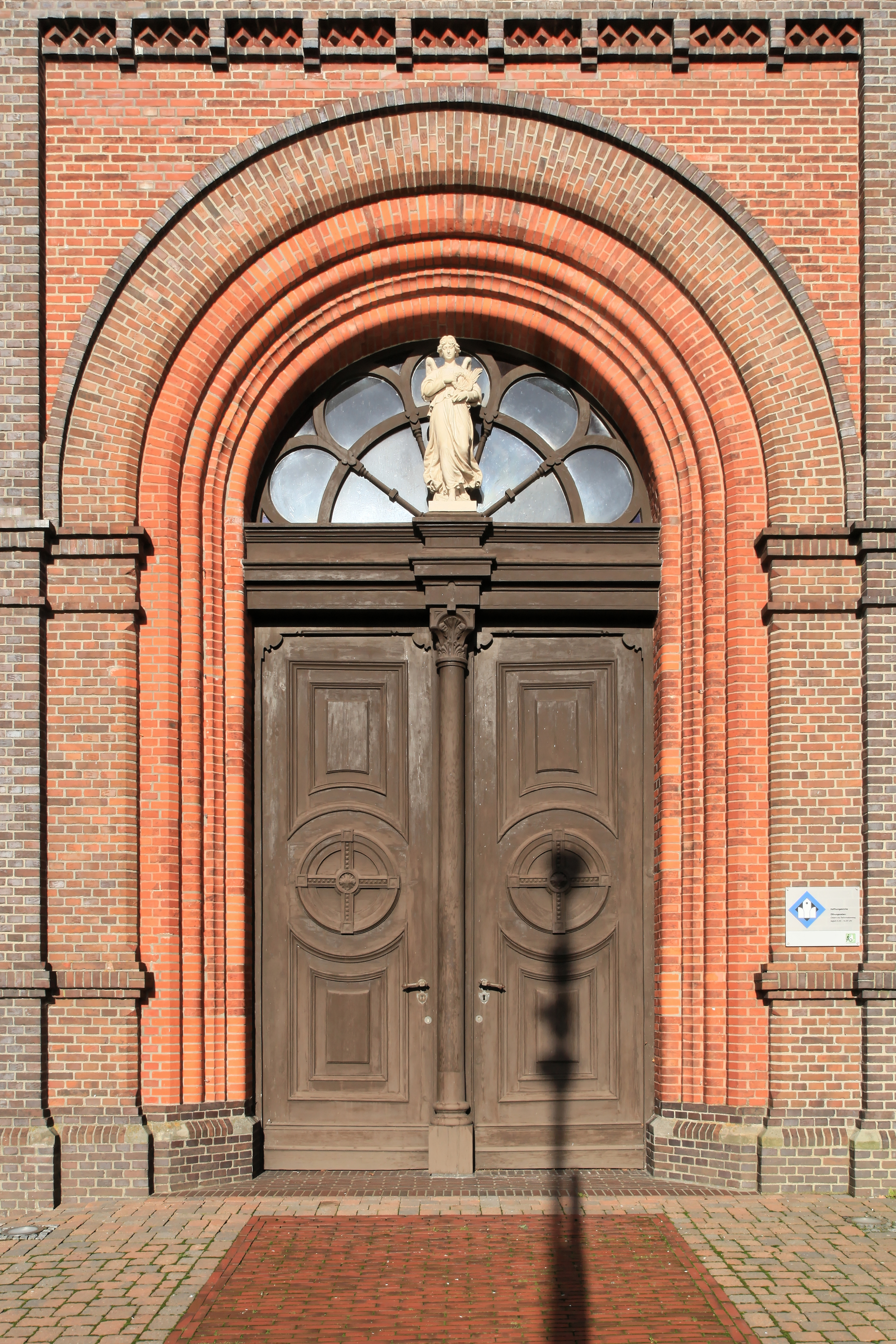 Hoffnungskirche, Untenende in Rhauderfehn